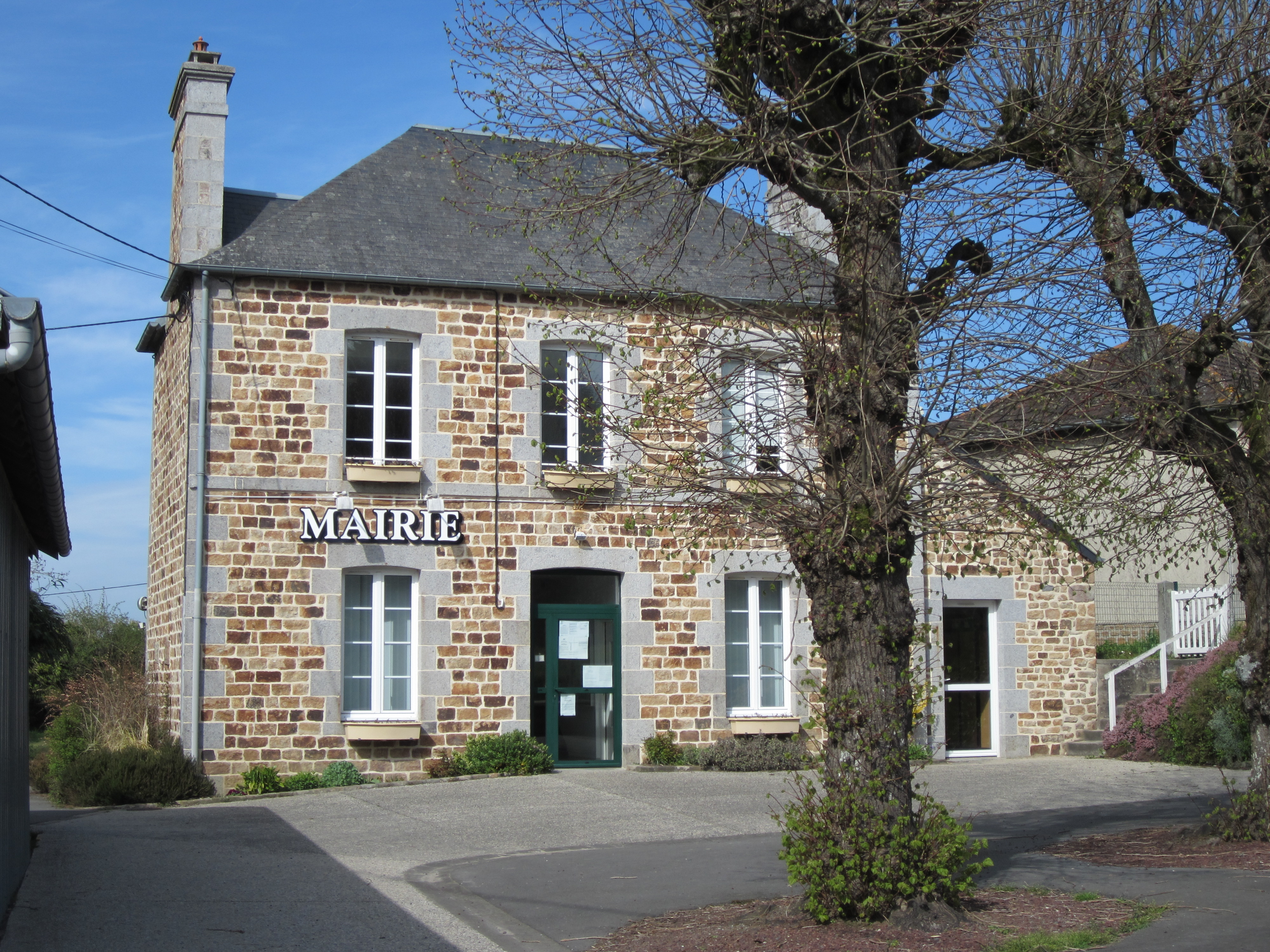 Saint-Pierre-Langers, Manche